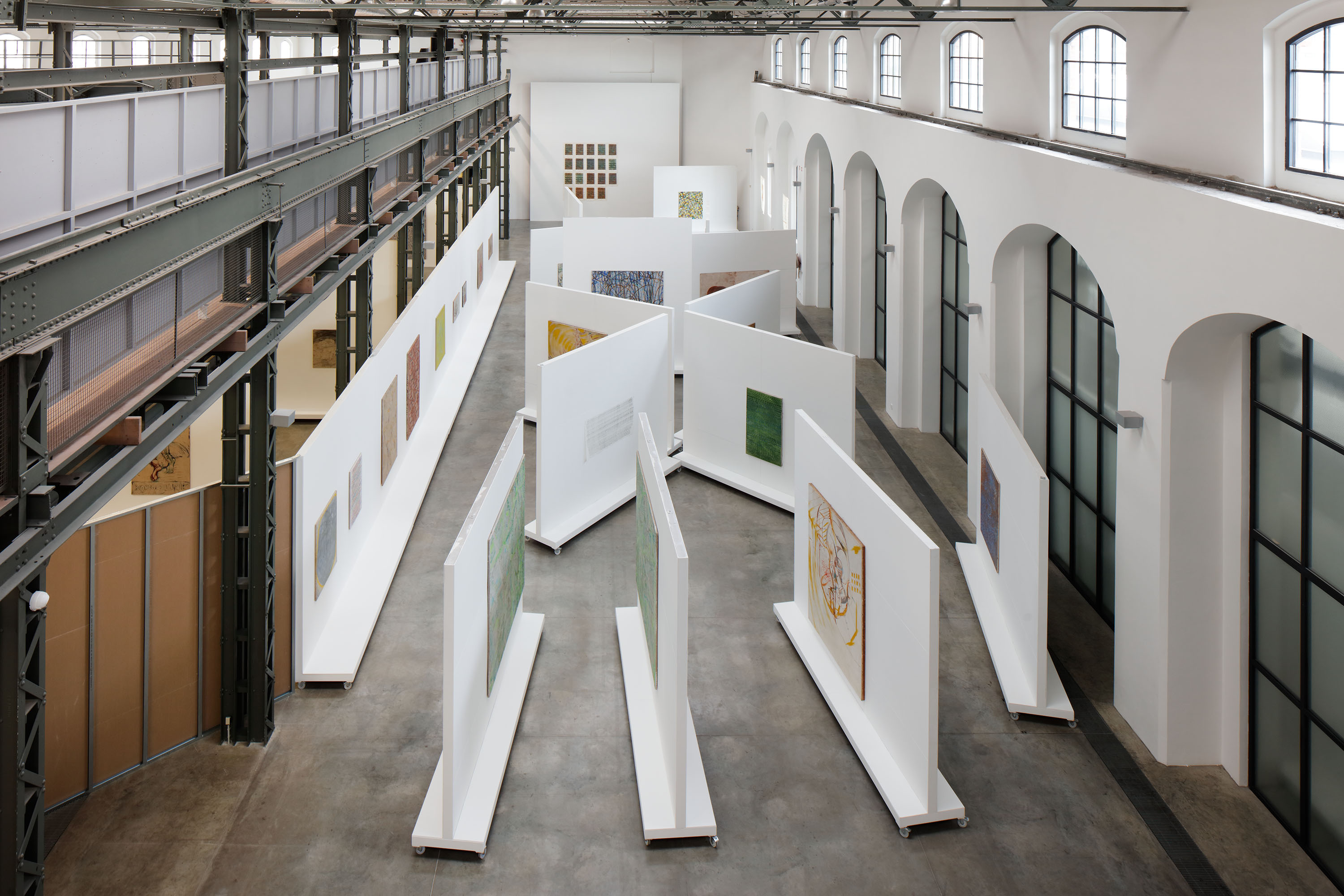 Výstava Vladimíra Kokolii, To nezbytné z Kokolii, Fait Gallery